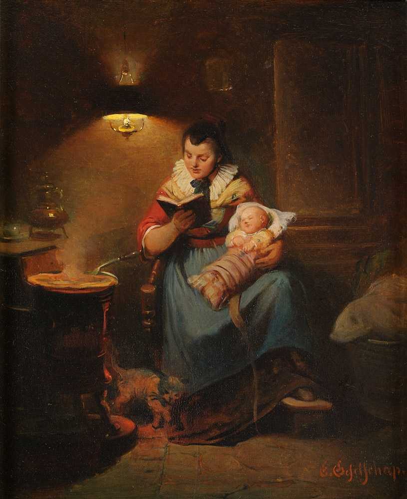 Die Gutenachtgeschichte. Signiert. Öl auf Holz, 27 x 23 cm